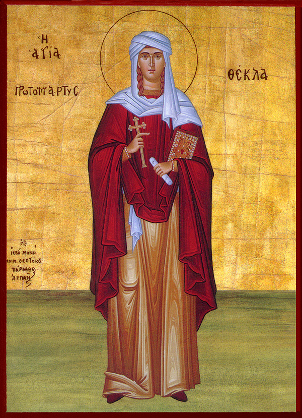 Santa Técla